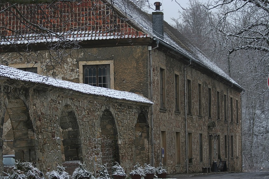 Westflügel Kloster Michaelstein am Harz